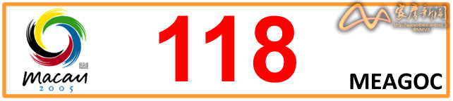 Kfz-Kenzeichen bei den Ostasien-Spielen in Macao 2005